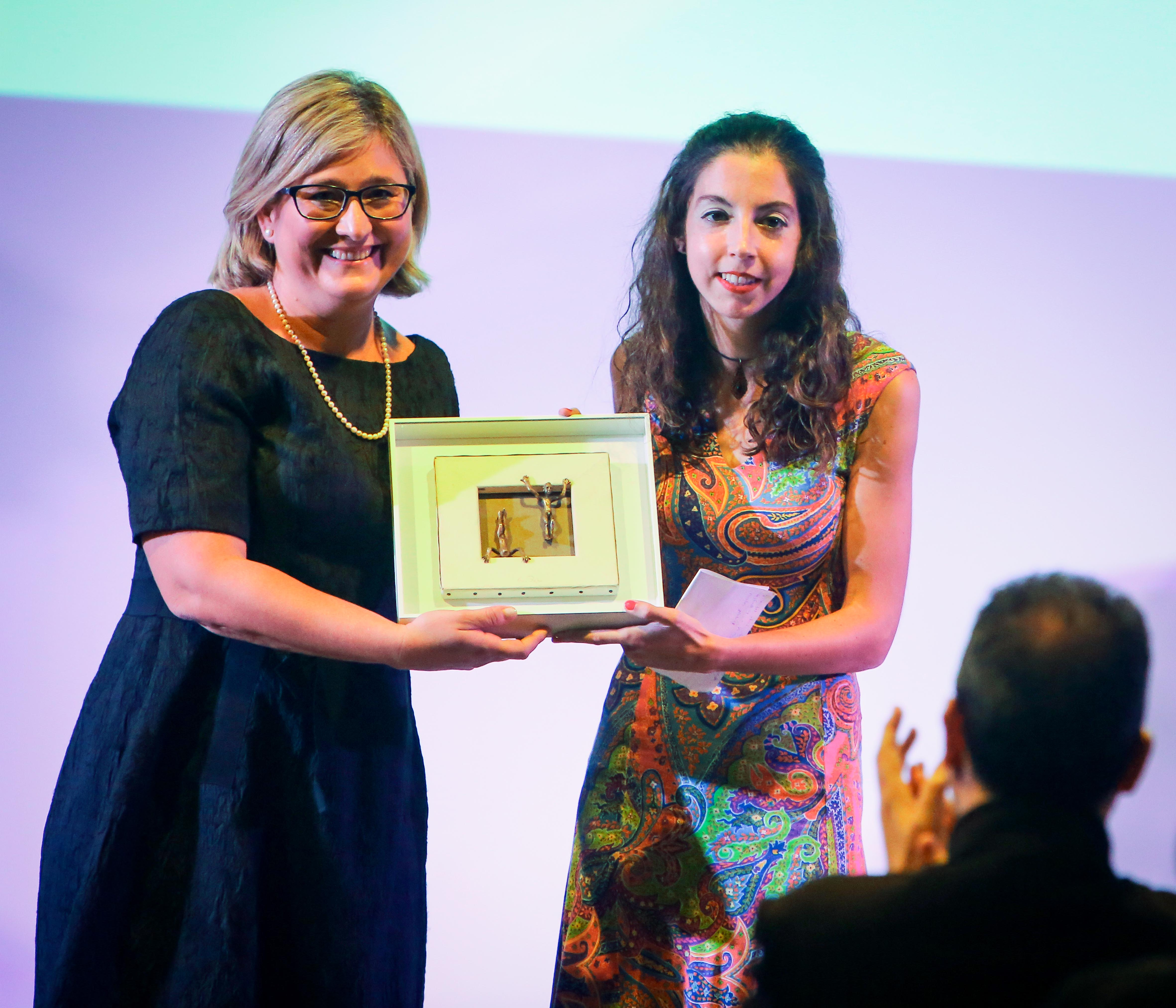 Gala dels premis València 2016